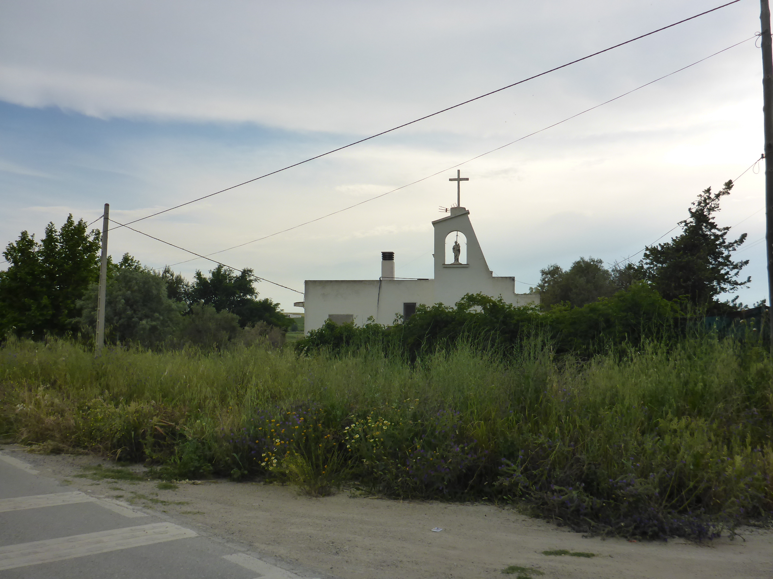 Las Tablas (Jerez de la Frontera)